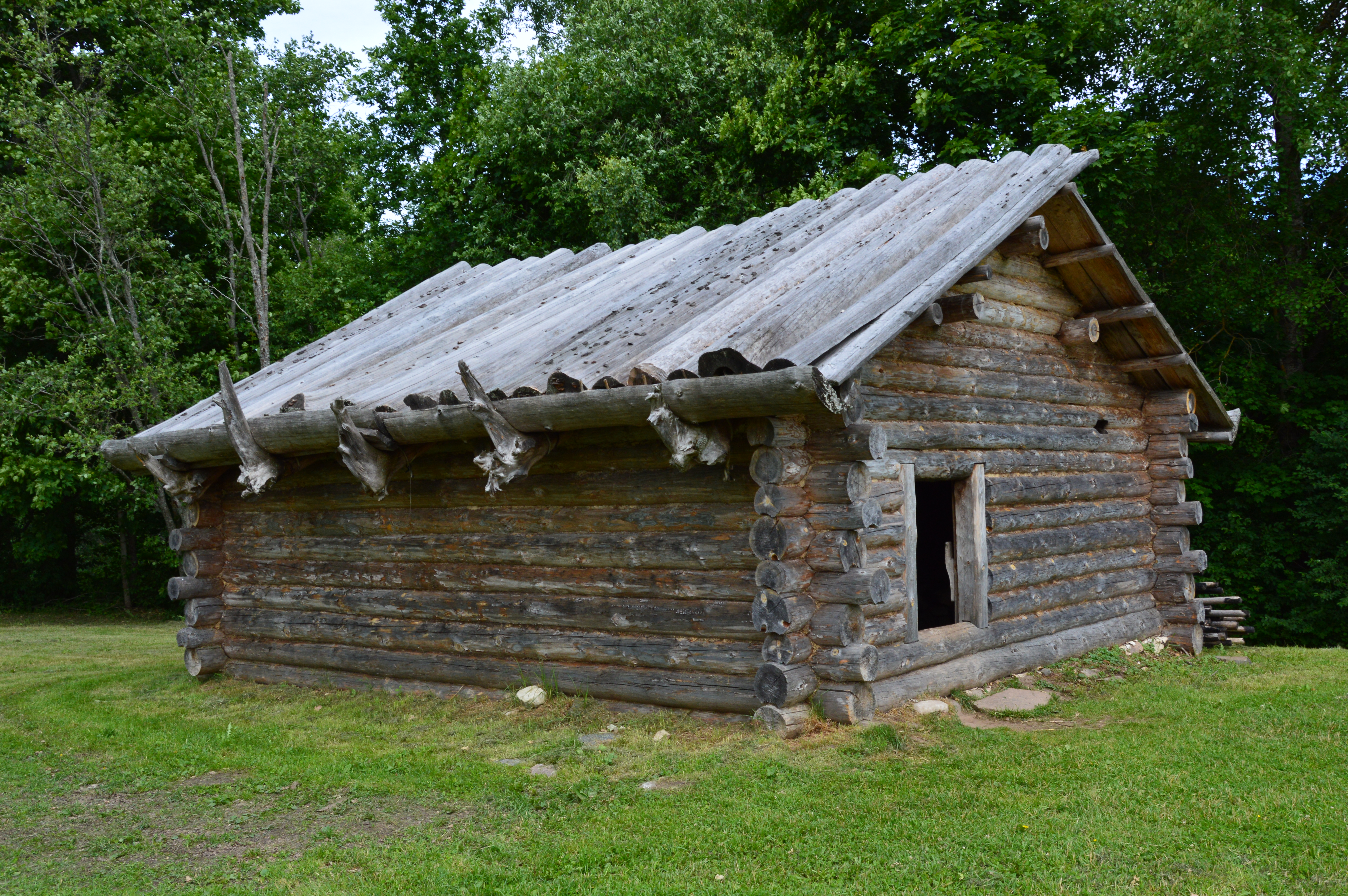 Rõuge muinastalu